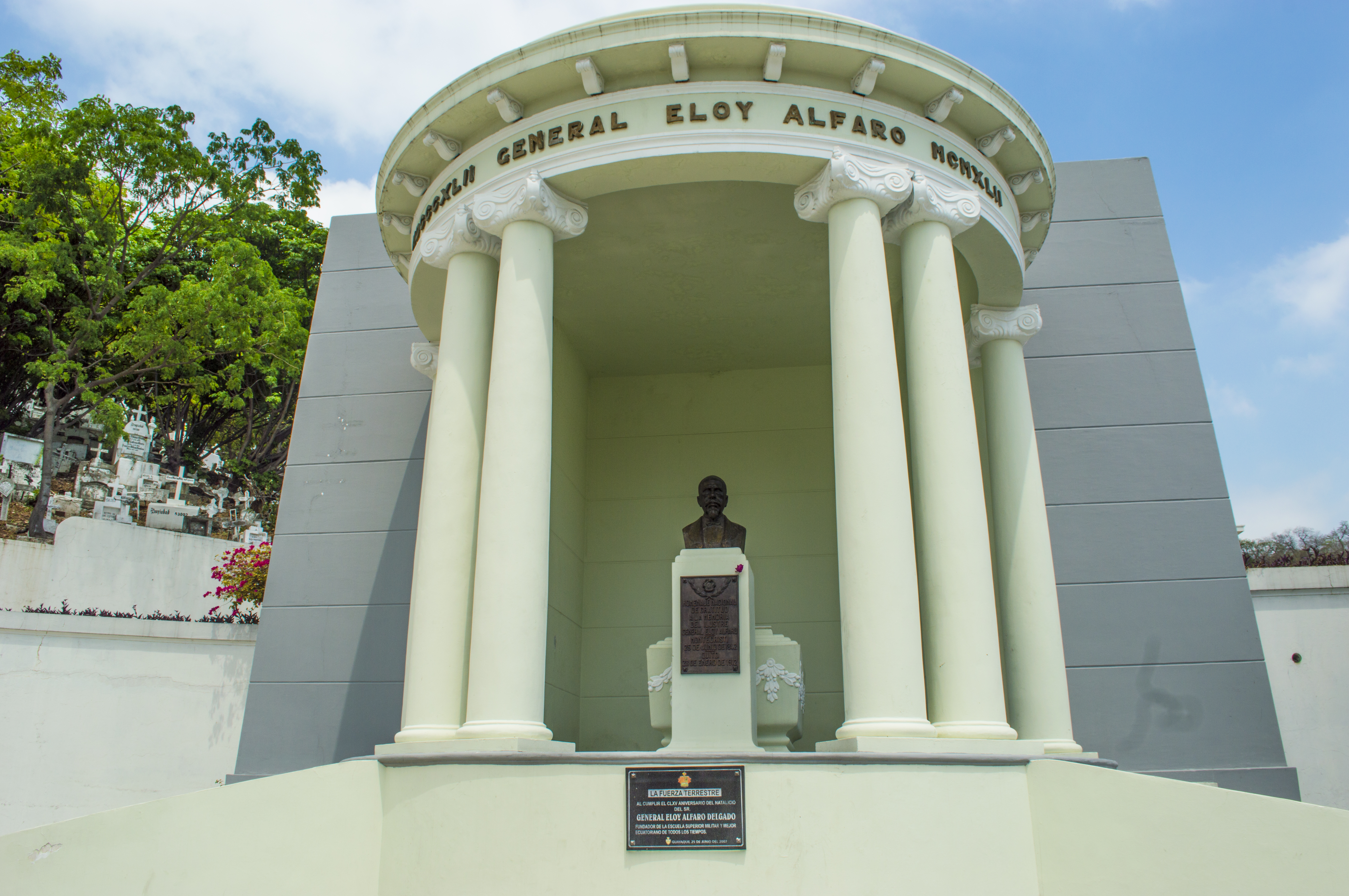 Edículo de Eloy Alfaro